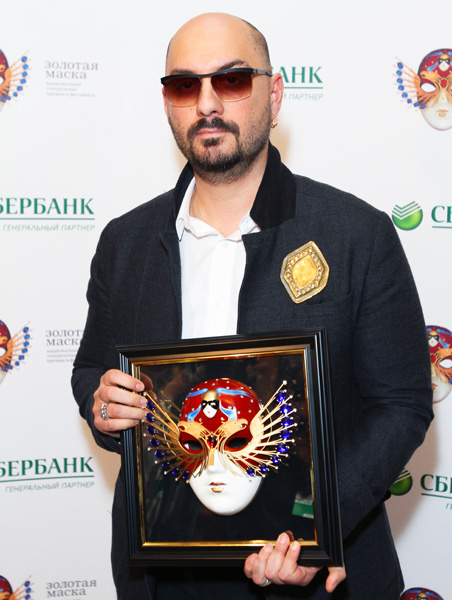 Фестиваль и премия «Золотая маска» 2012 года